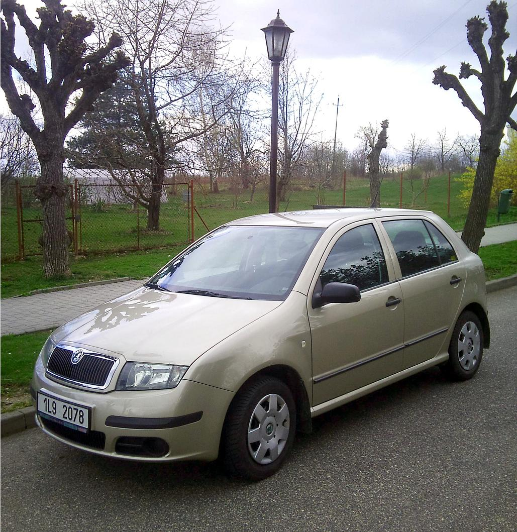 Skoda Fabia Limousine